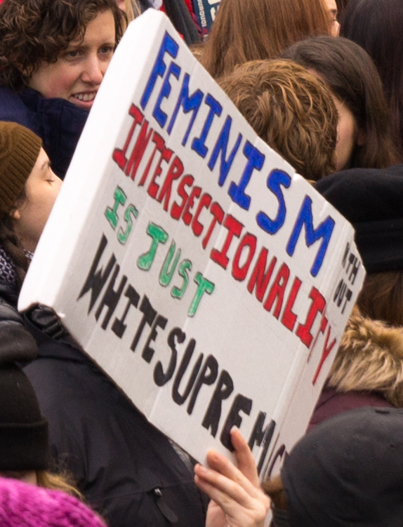 Ya goof!